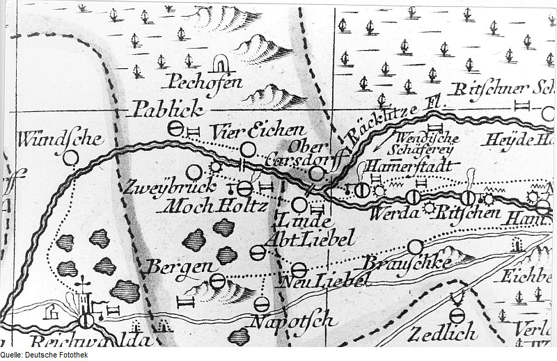 Original image description from the Deutsche Fotothek Rietschen-Werda. Oberlausitzkarte, Schenk, 1759